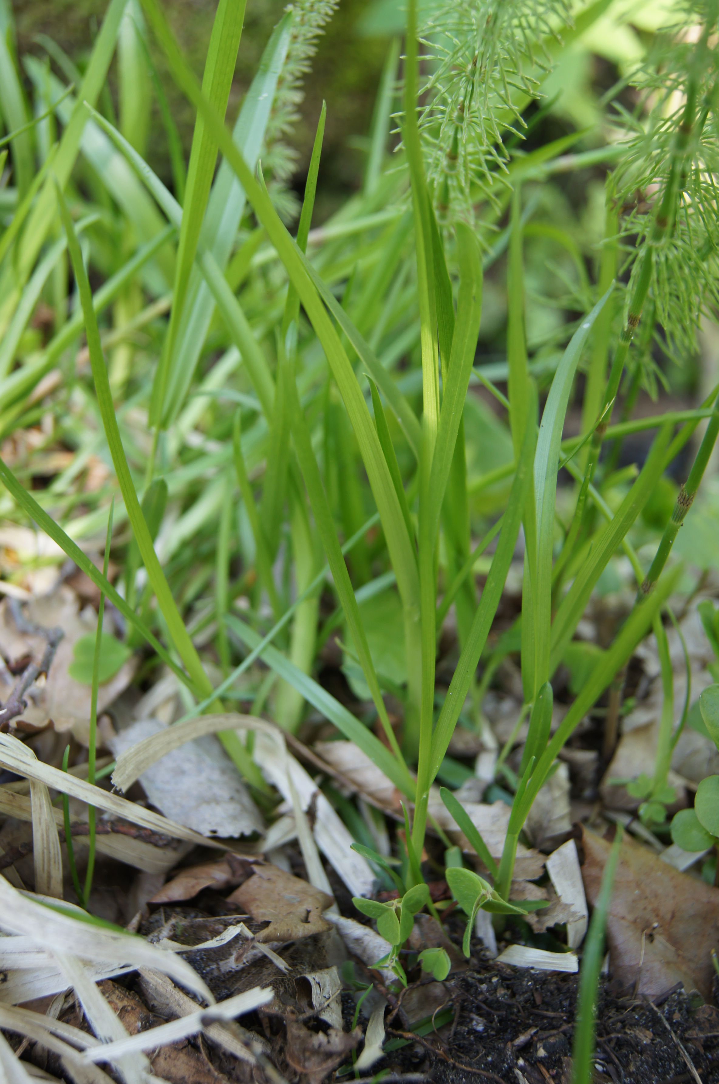 Retažiedė miglė (Poa remota)